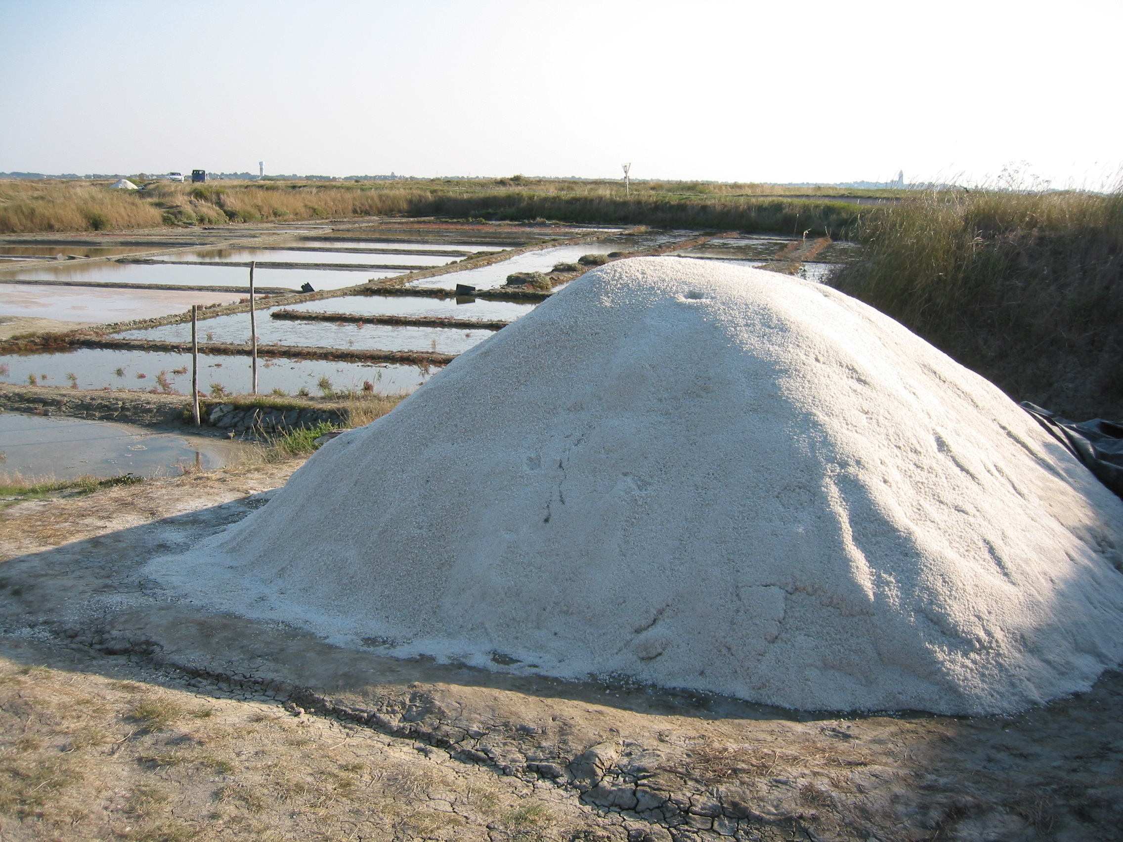 Batz sur Mer, Marais Saltants, Photo prise par Harrieta171 le 07/09/04